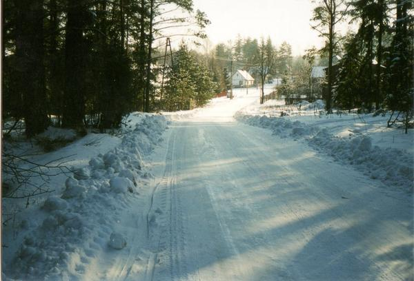 Gościniec Bielska – Zabłudów – Gródek – Grodno. Trakt ten był znany podróżującym już w XVI wieku. Obecnie jest to droga powiatowa od Żedni do Sokolego o odcinku 3,28 km. Na zdjęciu, wjazd do Sokolego od Stanku, widać pierwsze zabudowania wsi, a dalej to tory kolejowe. Ta cześć wsi nazywa się "Za Górą". Zdjęcie wykonano w dniu 12 stycznia 2003 roku, przy temperaturze - 16 stopni Celsjusza. (PD-self).